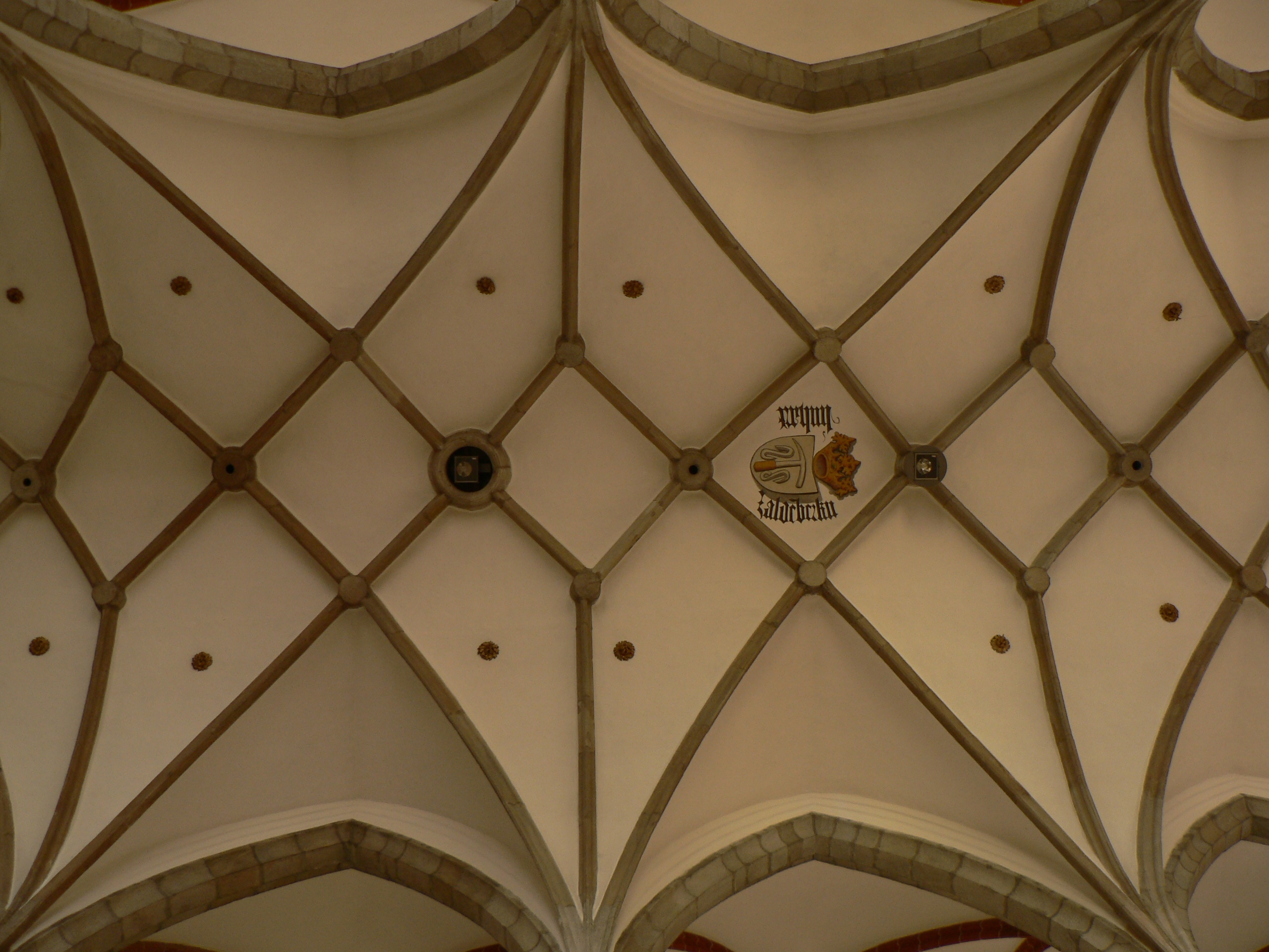 Kostel svatého Víta (Český Krumlov) - klenba hlavní lodi